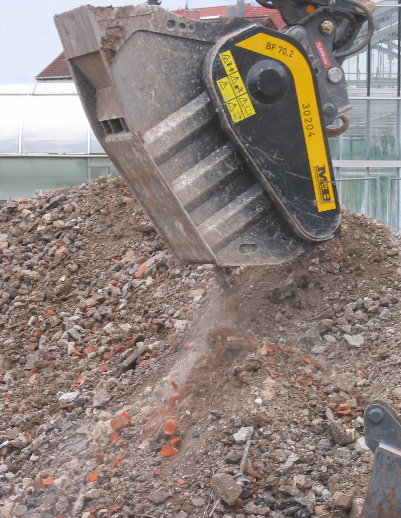 Brecherlöffel